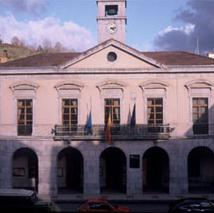 Ayuntamiento de Piloña, Asturias.